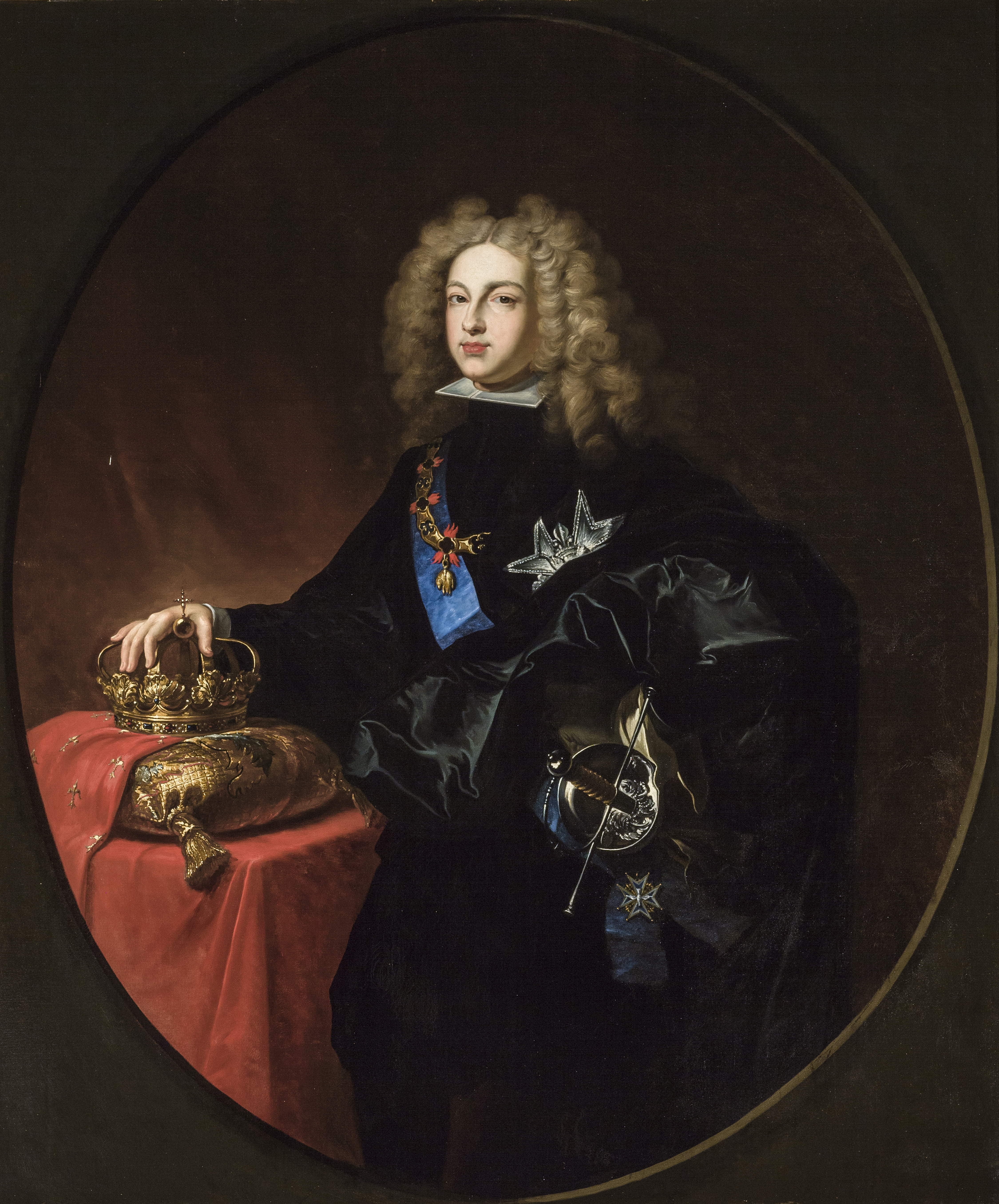 Retrato del rey Felipe V de España (1683-1746), que fue nieto del rey Luis XIV de Francia y el primer monarca de la Casa de Borbón en España.